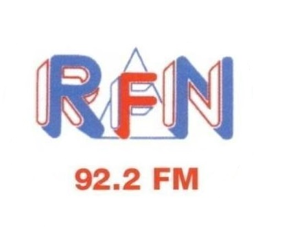 Ancien logos de la station Radio Fréquence Nîmes (R.F.N)